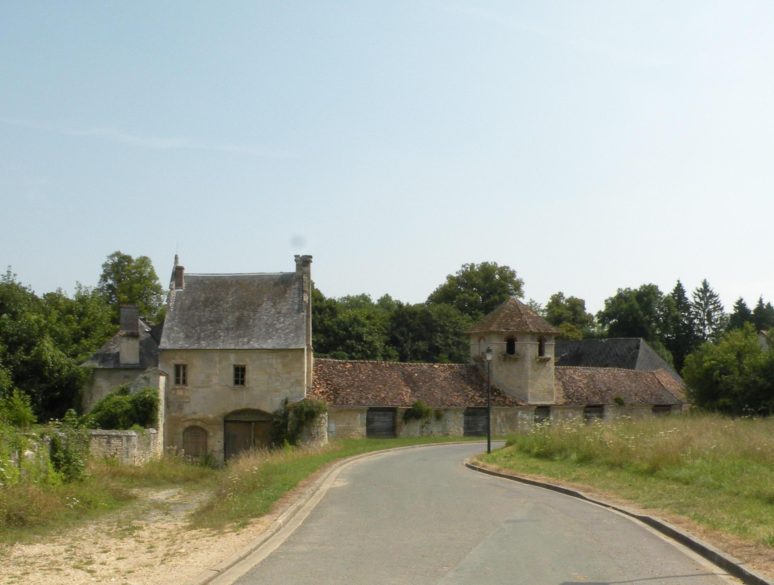 ancien relais? Menouville